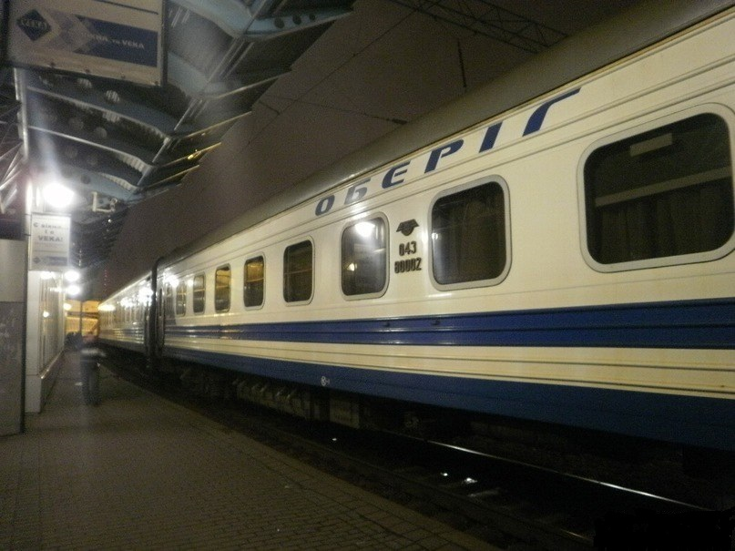 Вагон фирменного поезда №63/64 «Оберег» Харьков — Киев.